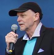 Södra Station får Ted Gärdestadsstipendiet 2016